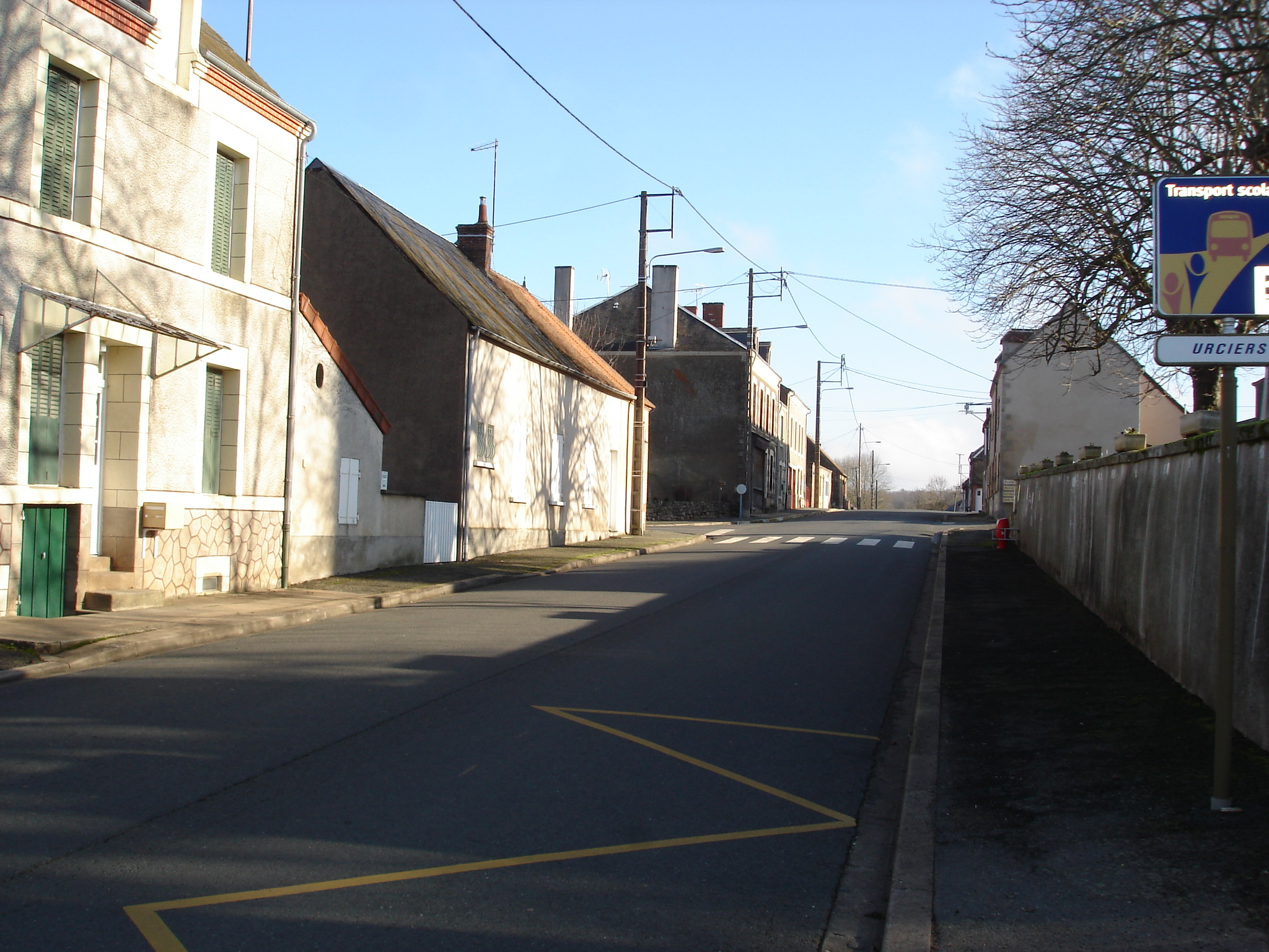 Urciers (36) : La route de Châteaumeillant (route départementale 26).